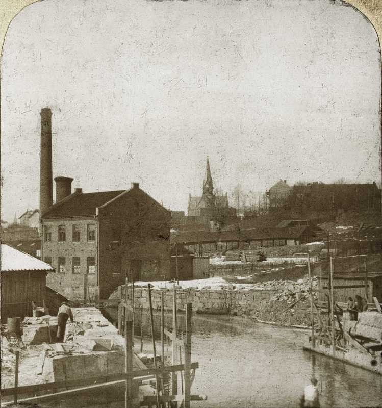 Bygging av Bentsebrua, Bentse teglverk, fabrikkbygninger, Sagene kirke i bakgrunnen.